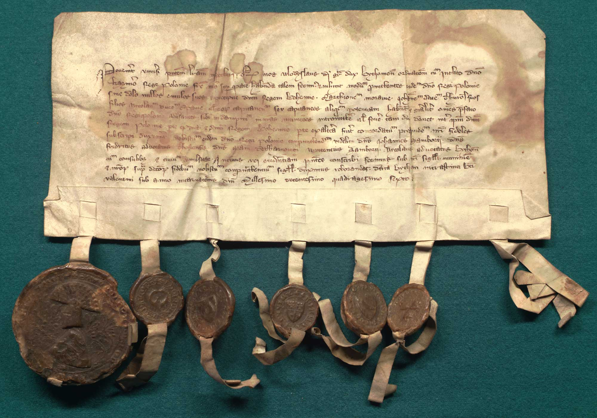 Fr. Luderus Ordin. b. Marie Theutonic, magister general. 1334 Apr. 30. marienburc; przedłuża zawieszenie broni z Kazimierzem królem Polskim, zawarte w Toruniu 18 kwietnia 1333, najpierw do 24 czerwca roku bieżącego, a następnie do tegoż dnia doku 1335. Oryginał w zbiorach AGAD. Pergamin, u którego przywieszono 7 pieczęci, t.j. Wielkiego Mistrza i 6 dostojników Zakonu